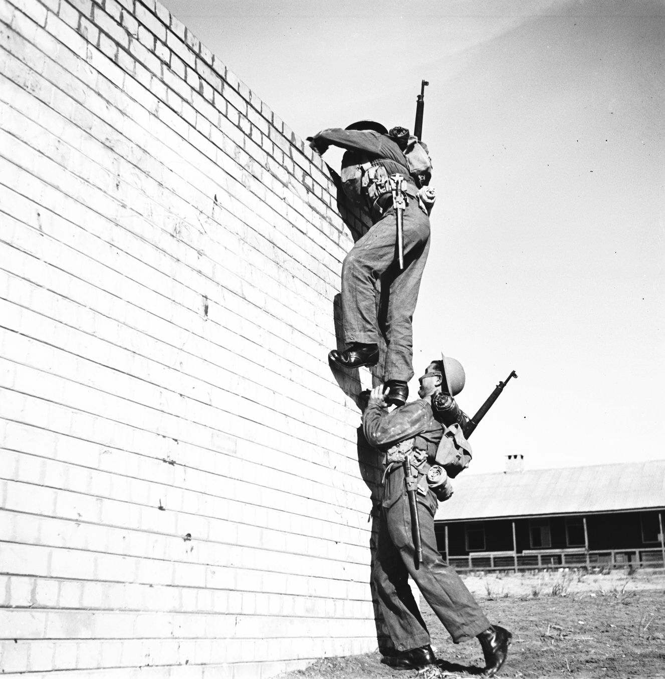 אוסף צילומים של הצלם זולטן קלוגר טווח מספרי התשלילים 16590 - א16886: באפס - פלוגה 14 - Buffs